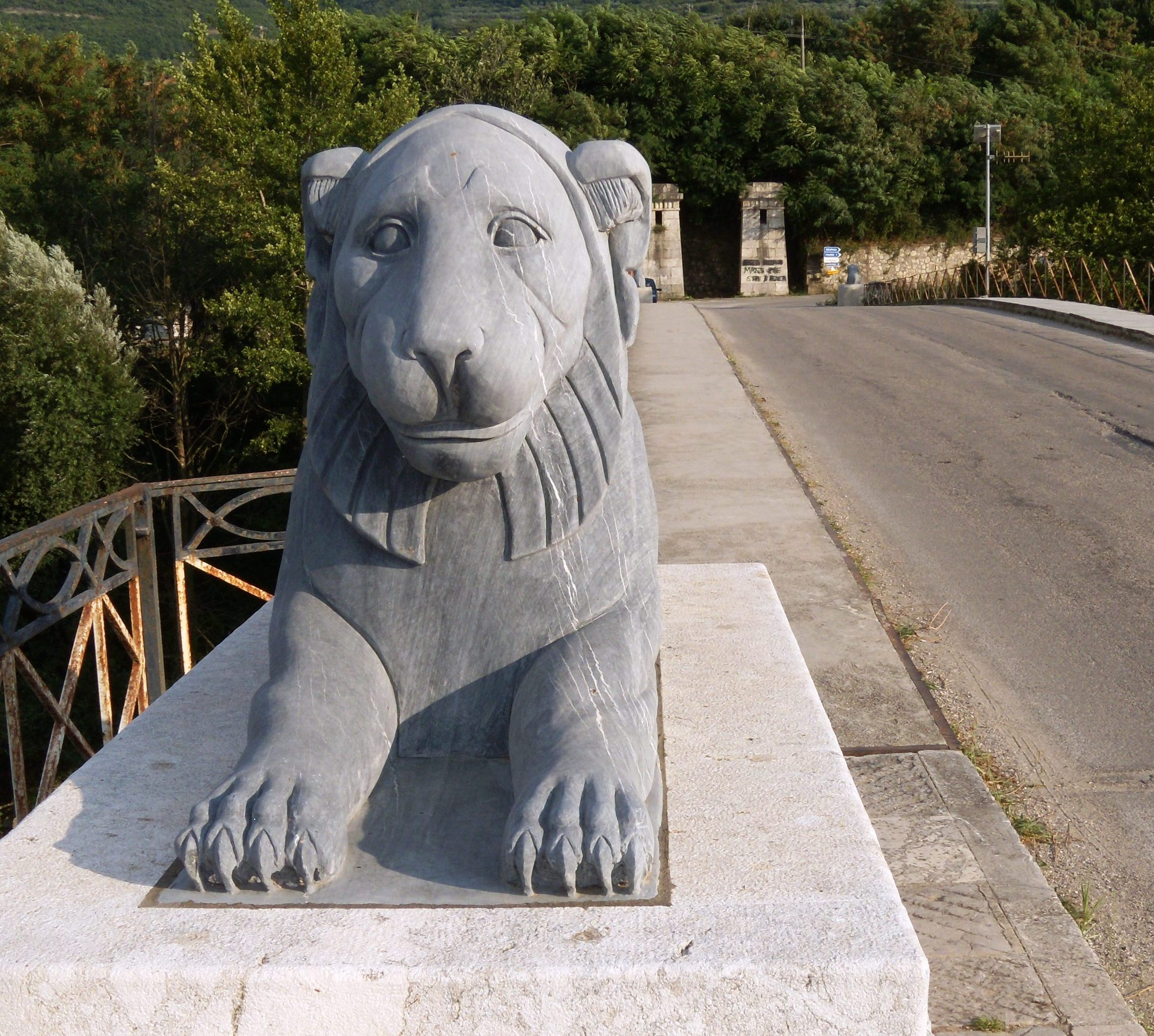 Uno dei quattro leoni in marmo del Ponte Maria Cristina a Solopaca (Bn-italia).